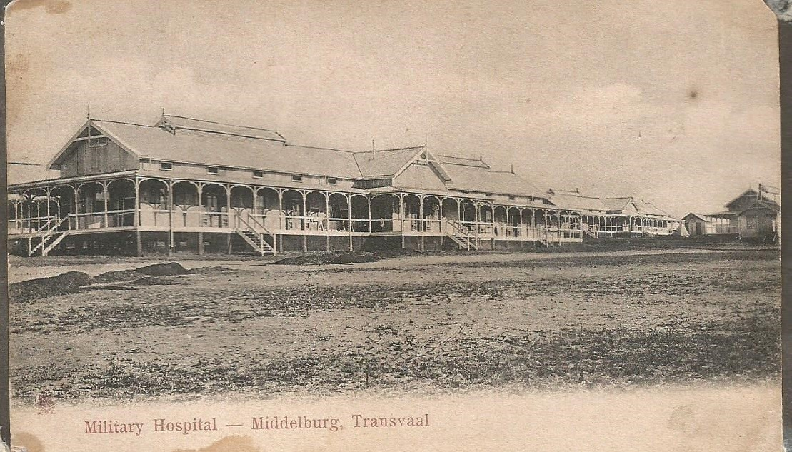 Militêre hospitaal - Wilma Bezuidenhout